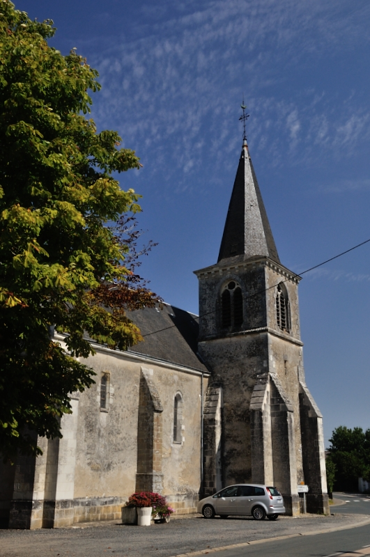 Sougé (Indre) - Eglise Saint-Hilaire